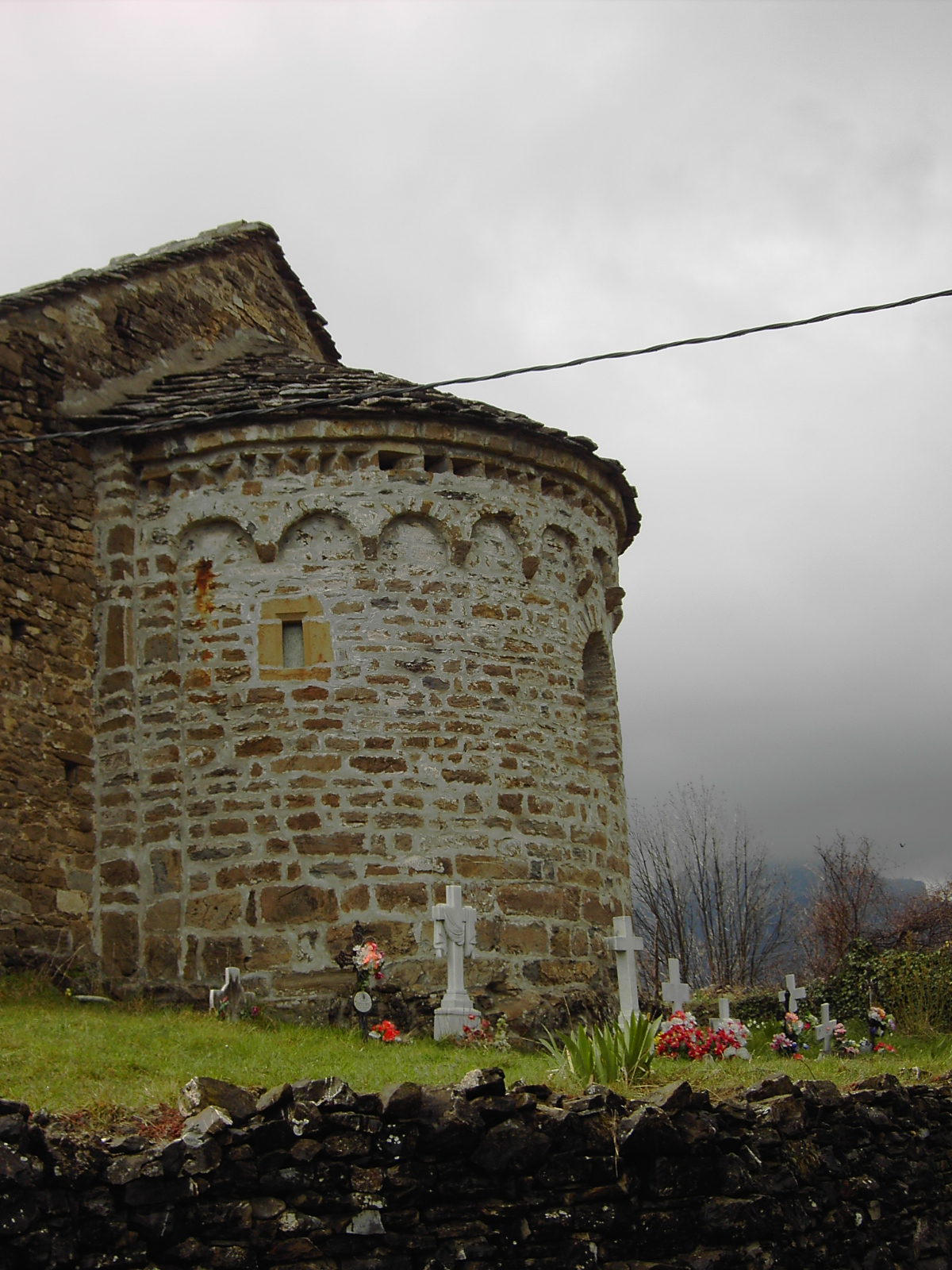 El ábside de la iglesia de Vió.